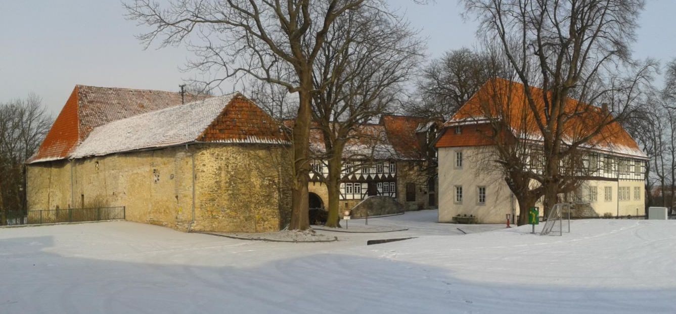 Ehemalige Wasserburg in Salzgitter-Gebhardshagen, Panoramaaufnahme von Süden